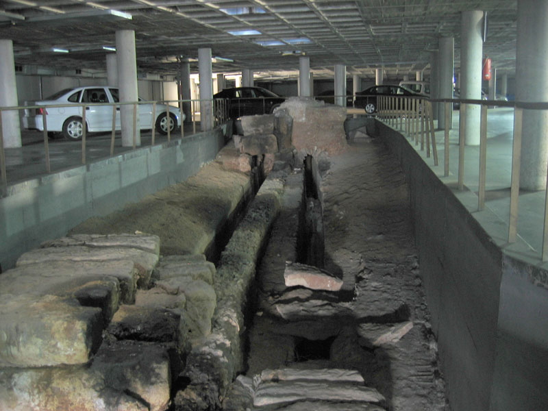 Restos del Acueducto Aqua Fontis Aureae integrados en el aparcamiento de la Estación de Autobuses, en Córdoba (España)